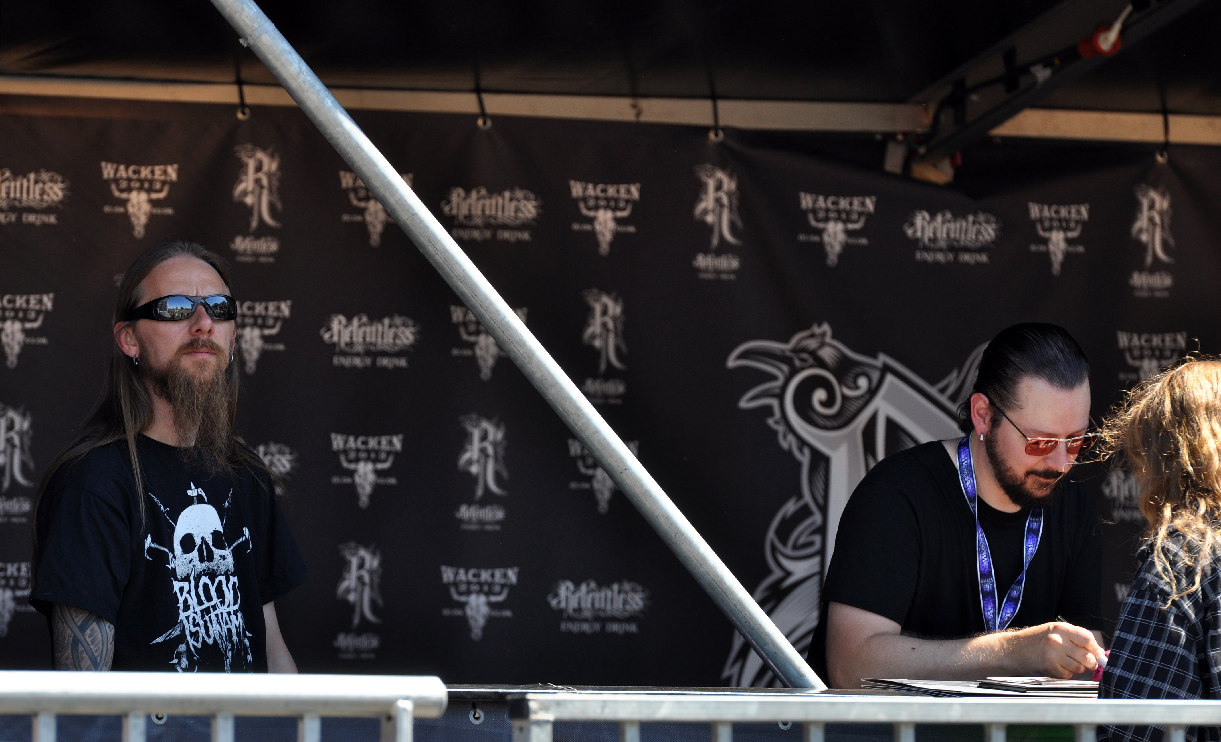 Tomas „Samoth“ Haugen and Vegard „Ihsahn“ Tveitan at Wacken Open Air 2013